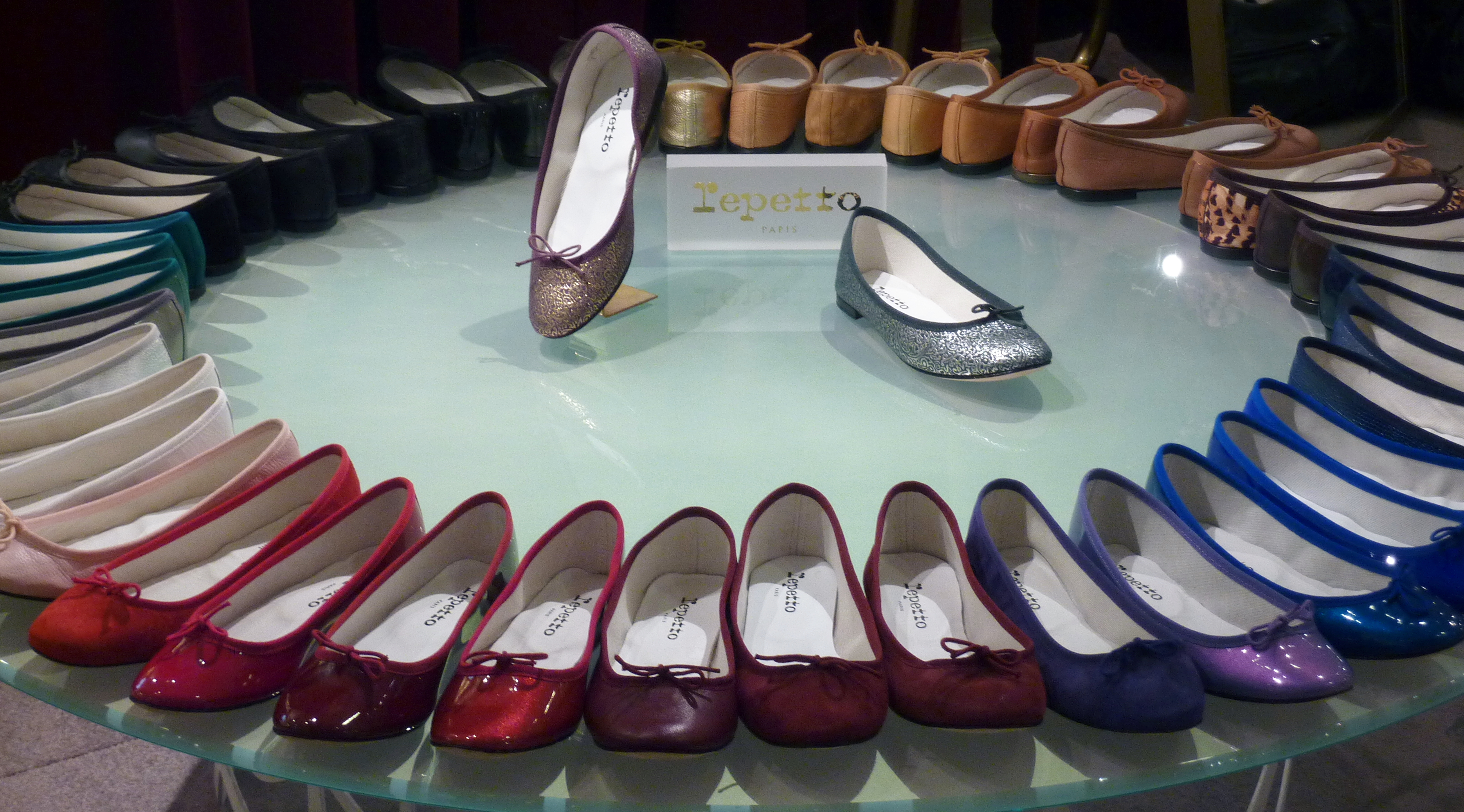 Präsentation von Repetto- Schuhen und Zubehör im Kaufhaus Printemps in Paris